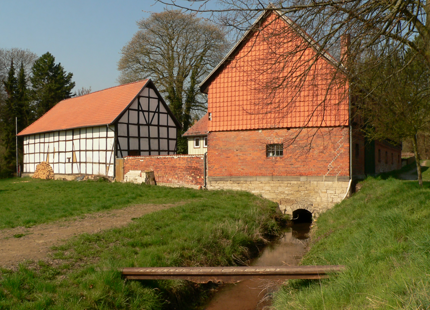 Wassermühle Liesebach mit Mühlenbach